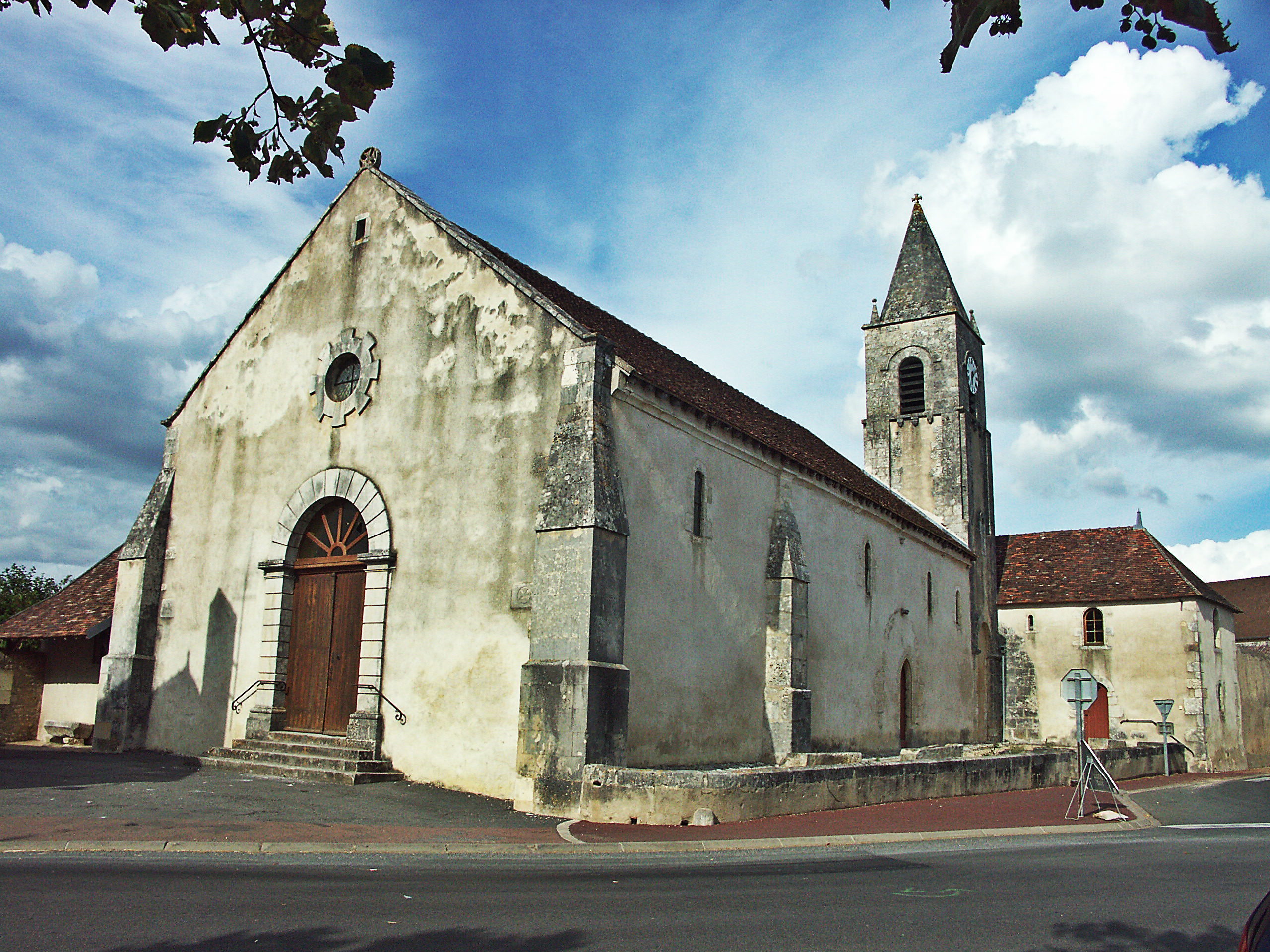 Église de Béthines, Vienne